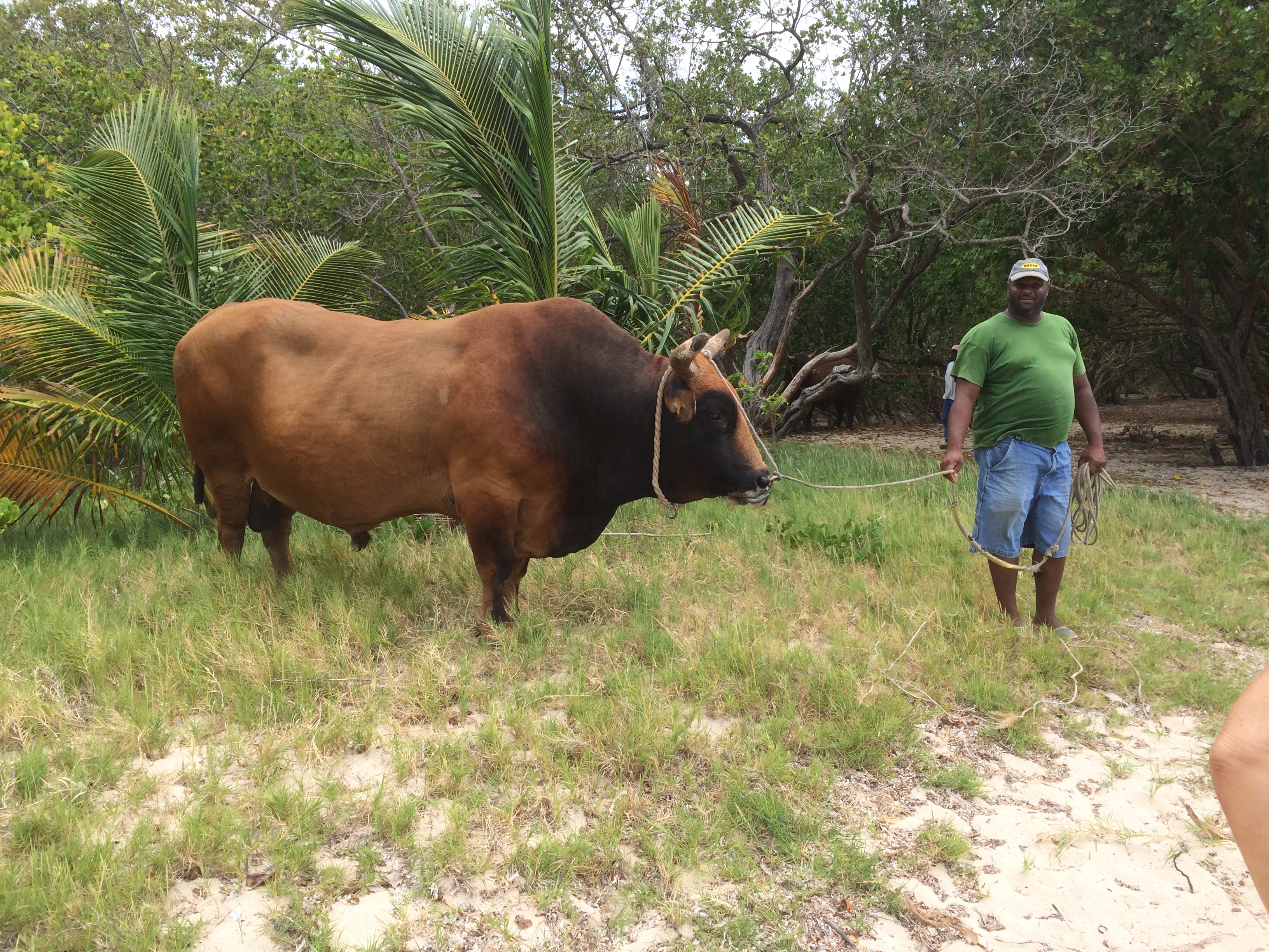 quelles masses